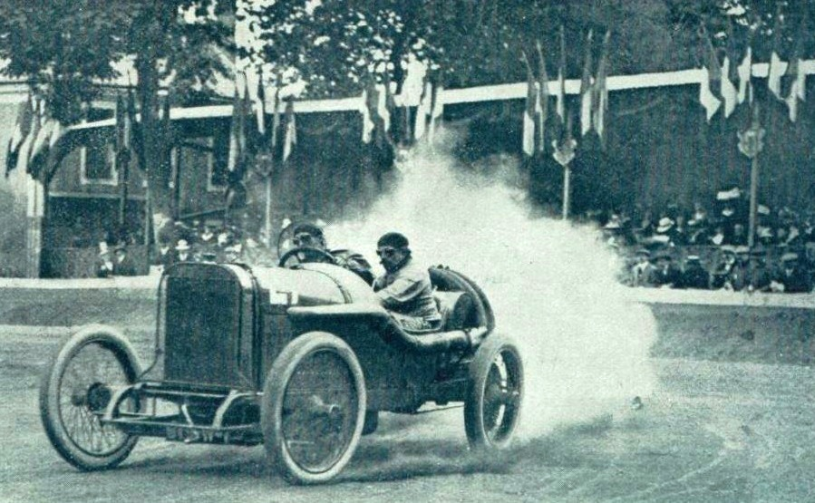 Jules Goux vainqueur de la Coupe de la Sarthe en 1912, sur Peugeot L-76 - La Vie au Grand Air du 14 septembre 1912, p.721